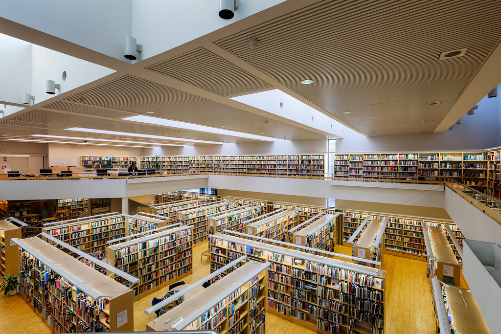 Iisalmen kaupunginkirjaston aikuistenosastoa